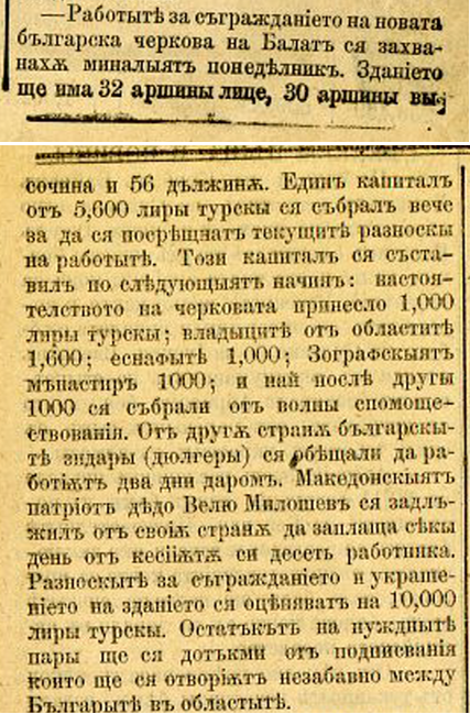 Страница от вестника Източно време